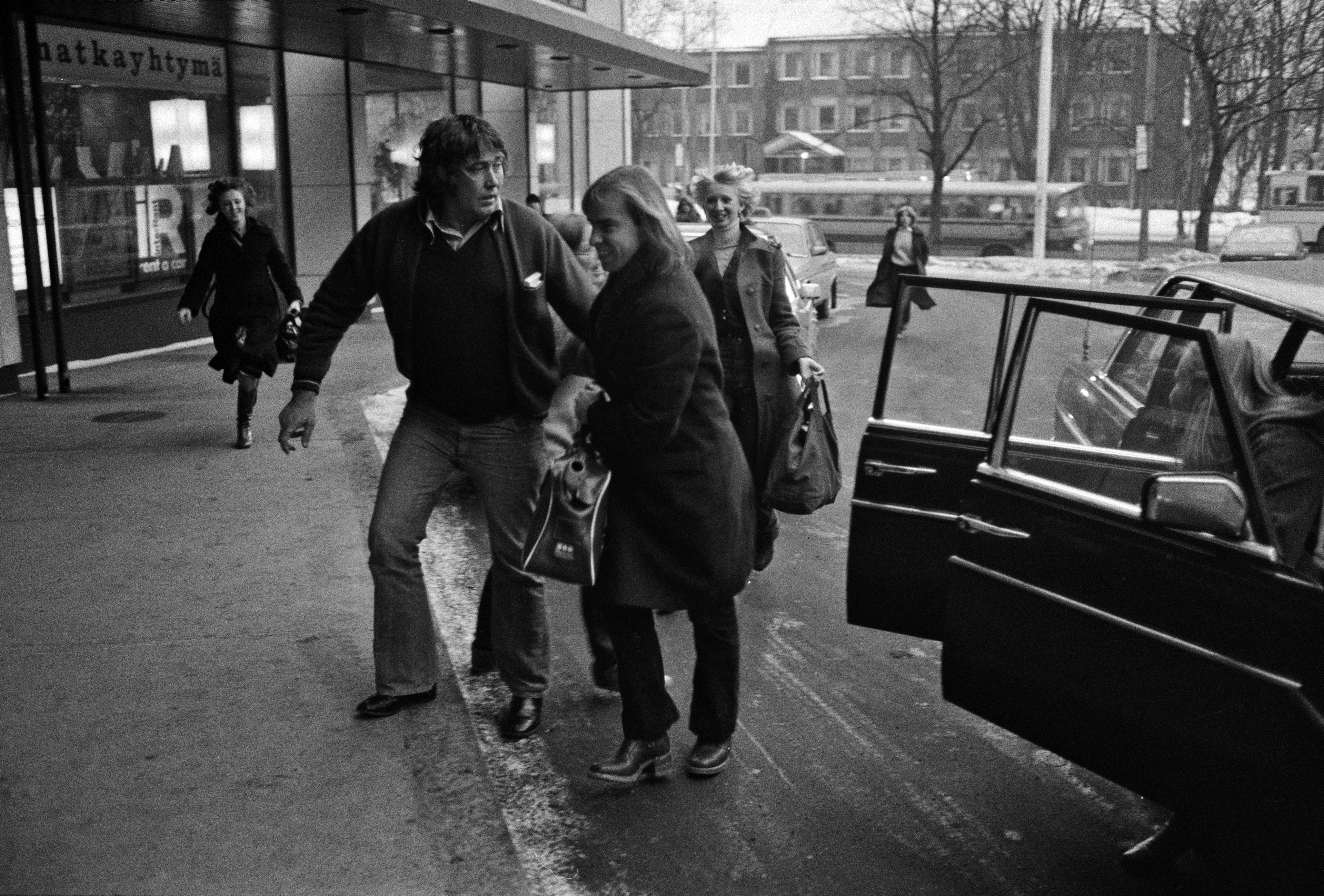 Bay City Rollers -yhtyeen rumpali Derek Longmuir on saapunut hotelli Hesperian edustalle; Bay City Rollers -yhtyeen rumpali Derek Longmuir on saapunut hotelli Hesperian edustalle. Fanit juoksevat häntä kohti. -- digirepro, dng ja tiff, mv